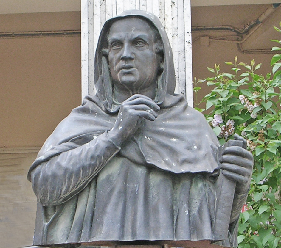 Angelo De Vico - Busto del giureconsulto Luca da Penne, Penne (PE), Piazza Luca da Penne